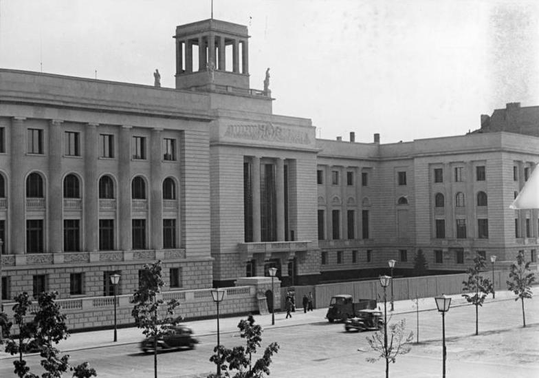 Berlin, sowjetische Botschaft Unter den Linden Berlin.- Botschaft der UdSSR Unter den Linden; ca. Mai 1951